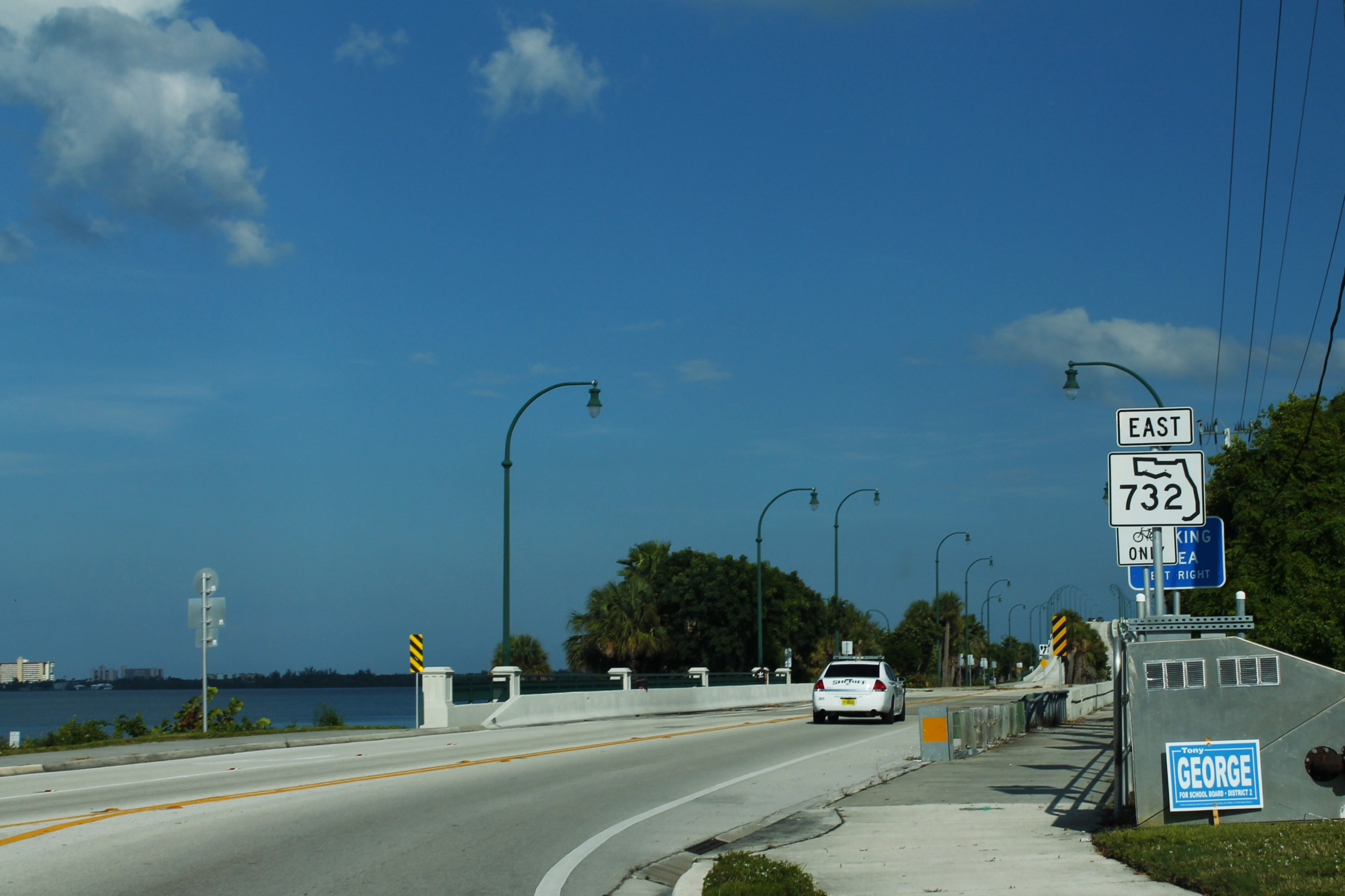 FL732 Sign